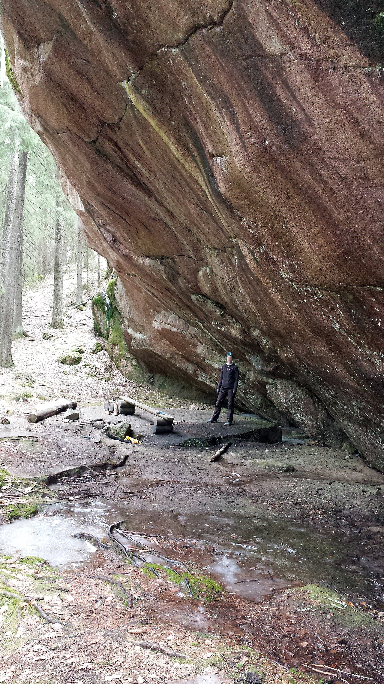 Paistjärven pirunkirkko on lippaluola Heinolassa entisen maalaiskunnan alueella Paistjärvellä.